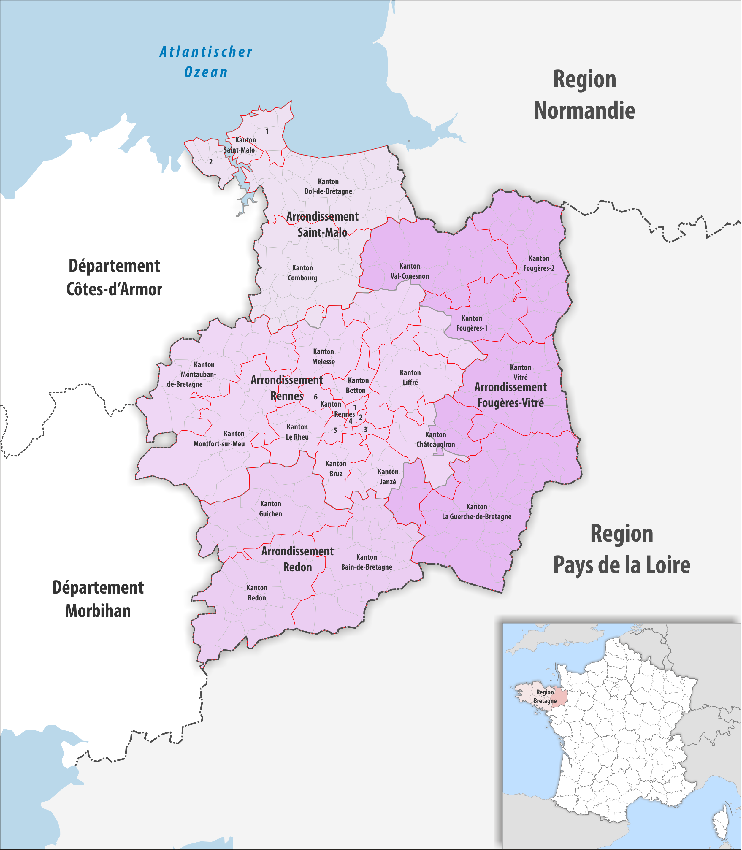 Gemeinden, Kantone und Arrondissemente im Departement Ille-et-Vilaine